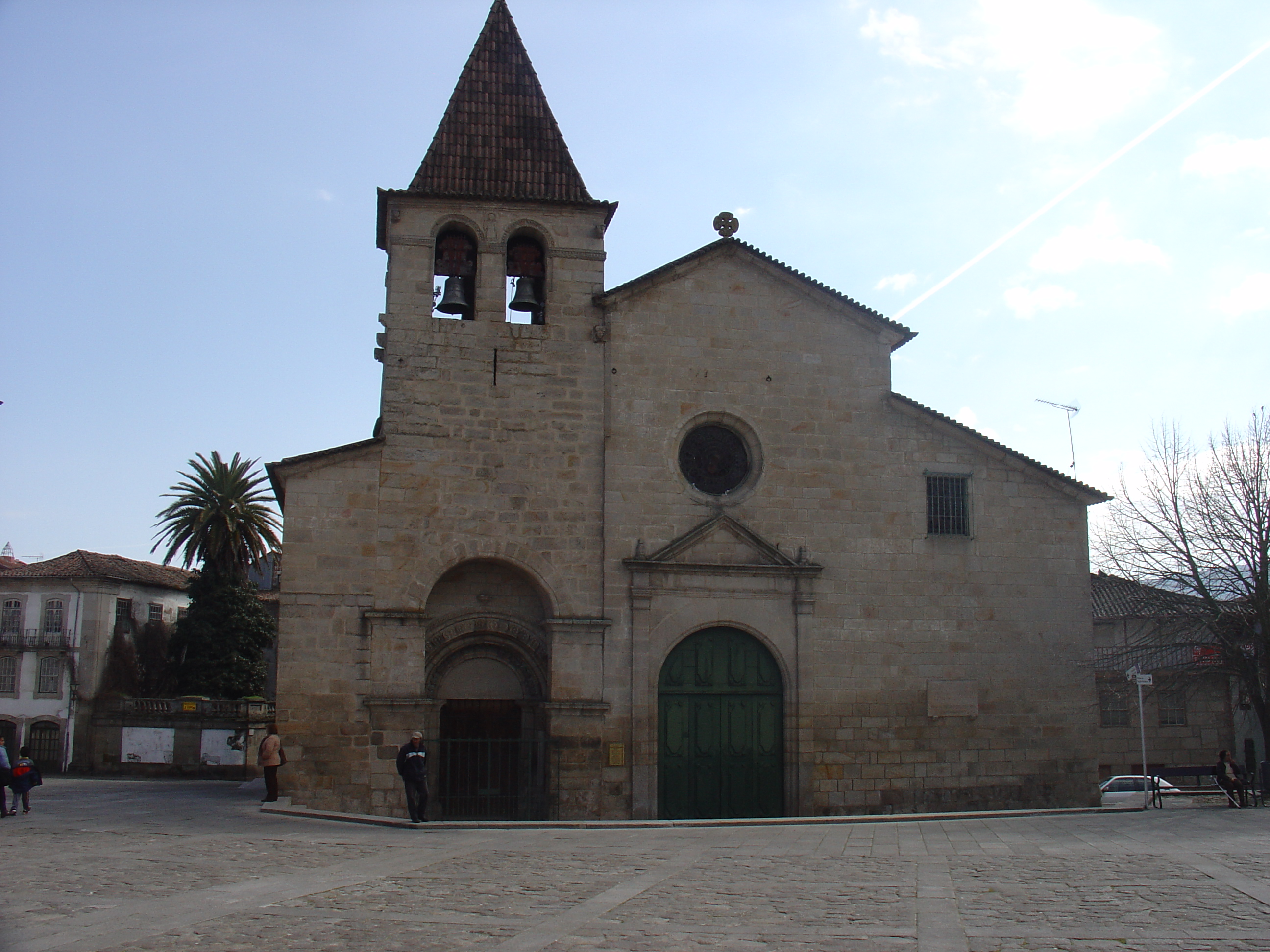 Chaves-Igreja Matriz